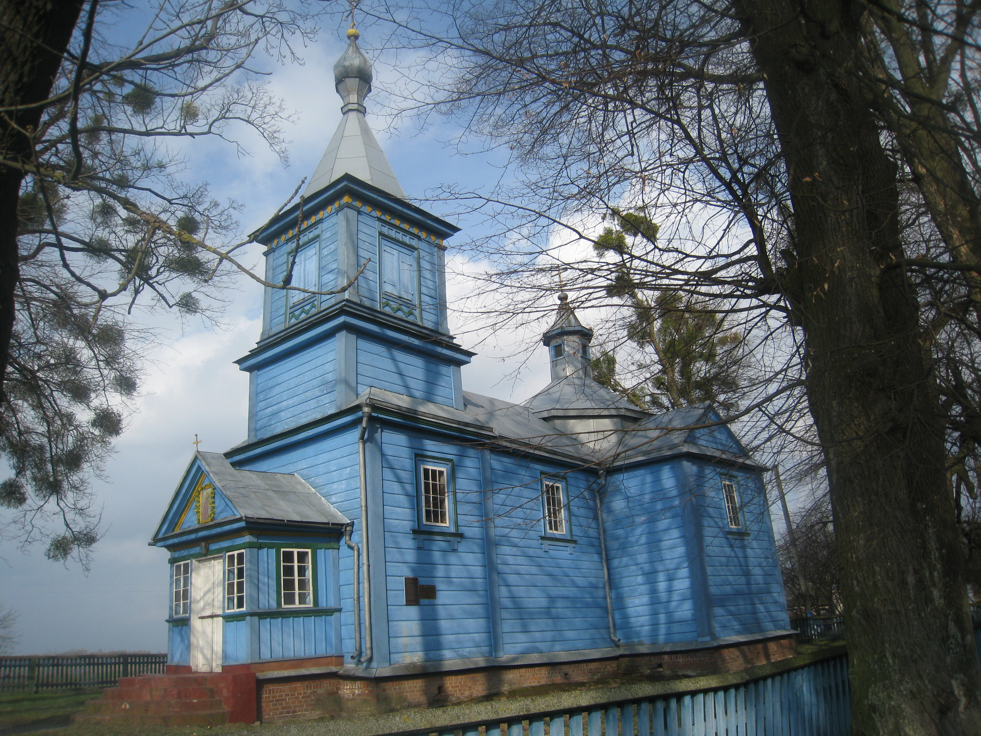 Михайлівська церква (дер.), Оса